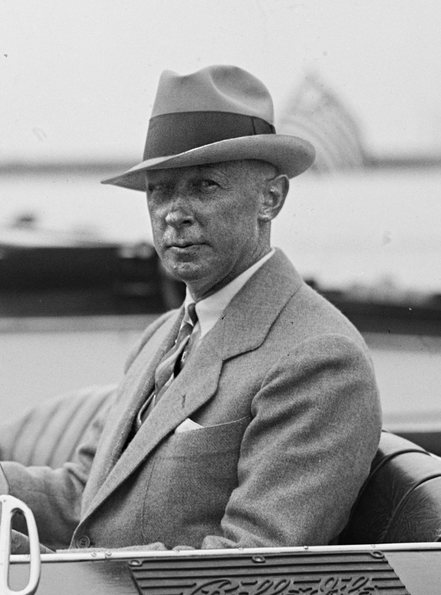 A. Atwater Kent, 1925